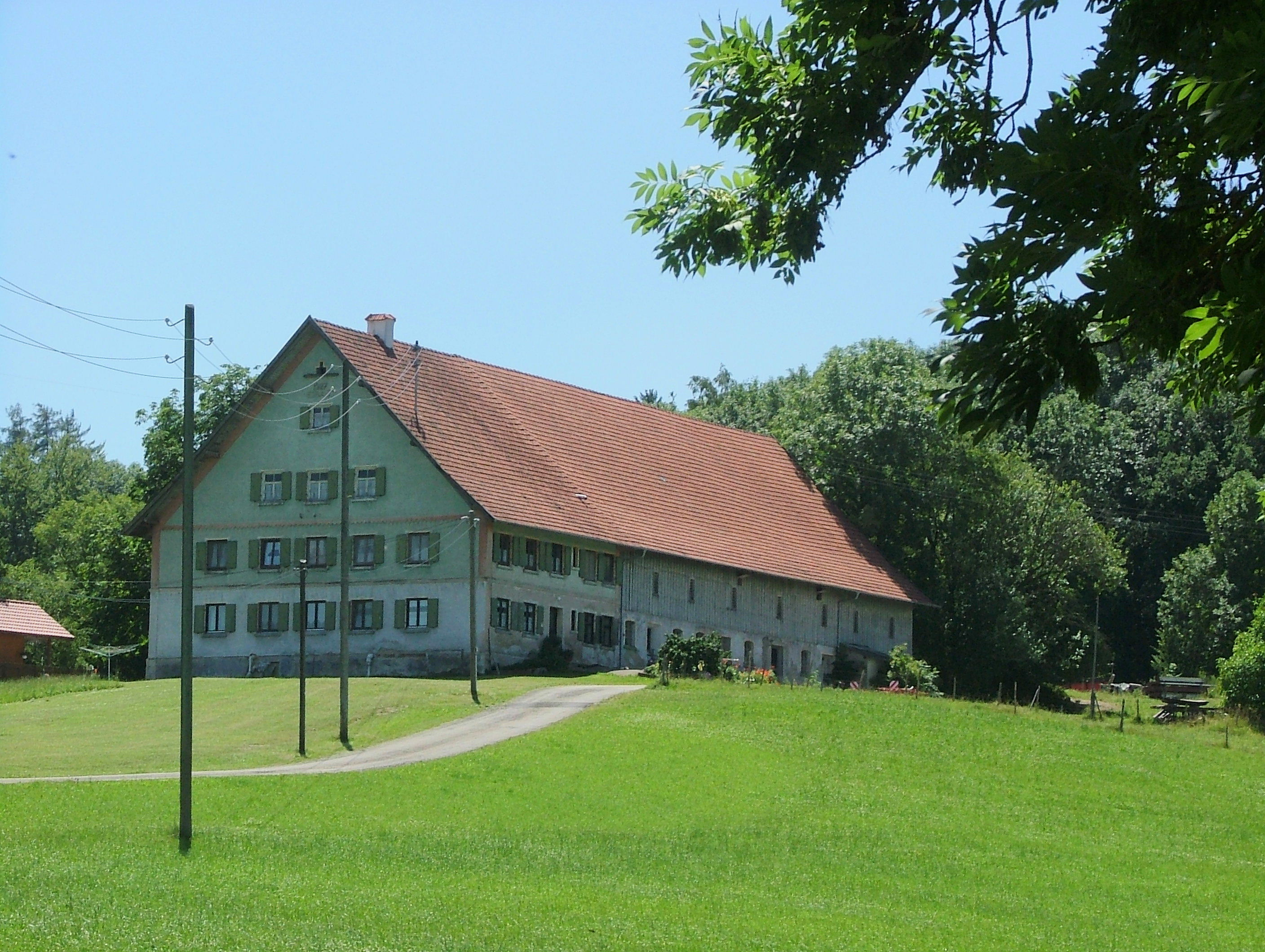 Schachenhof